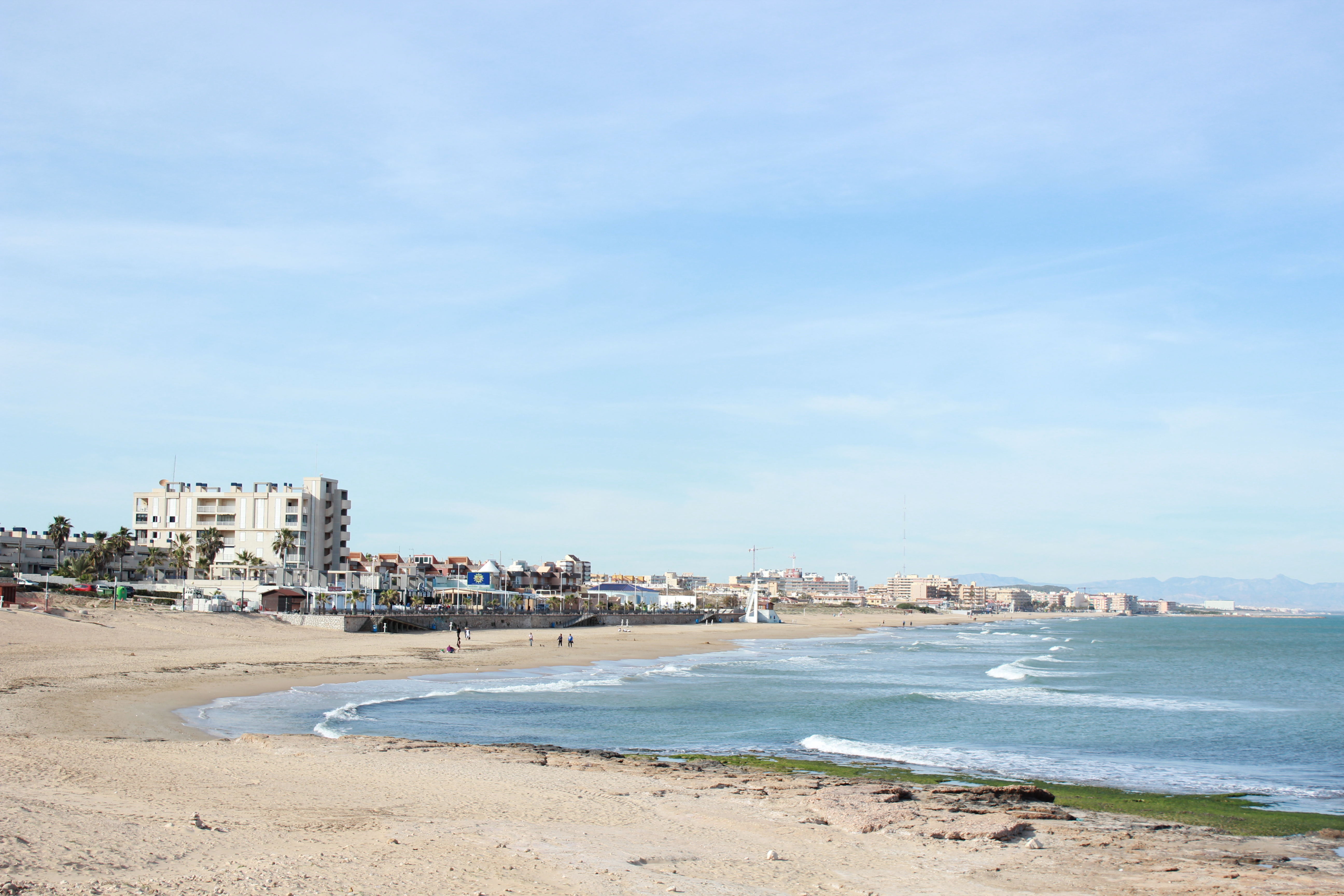 Beach